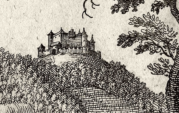 Burg Höhingen in Achkarren, Ausschnitt aus dem Kupferstich von Matthäus Merian von 1644 (gest. 1650)